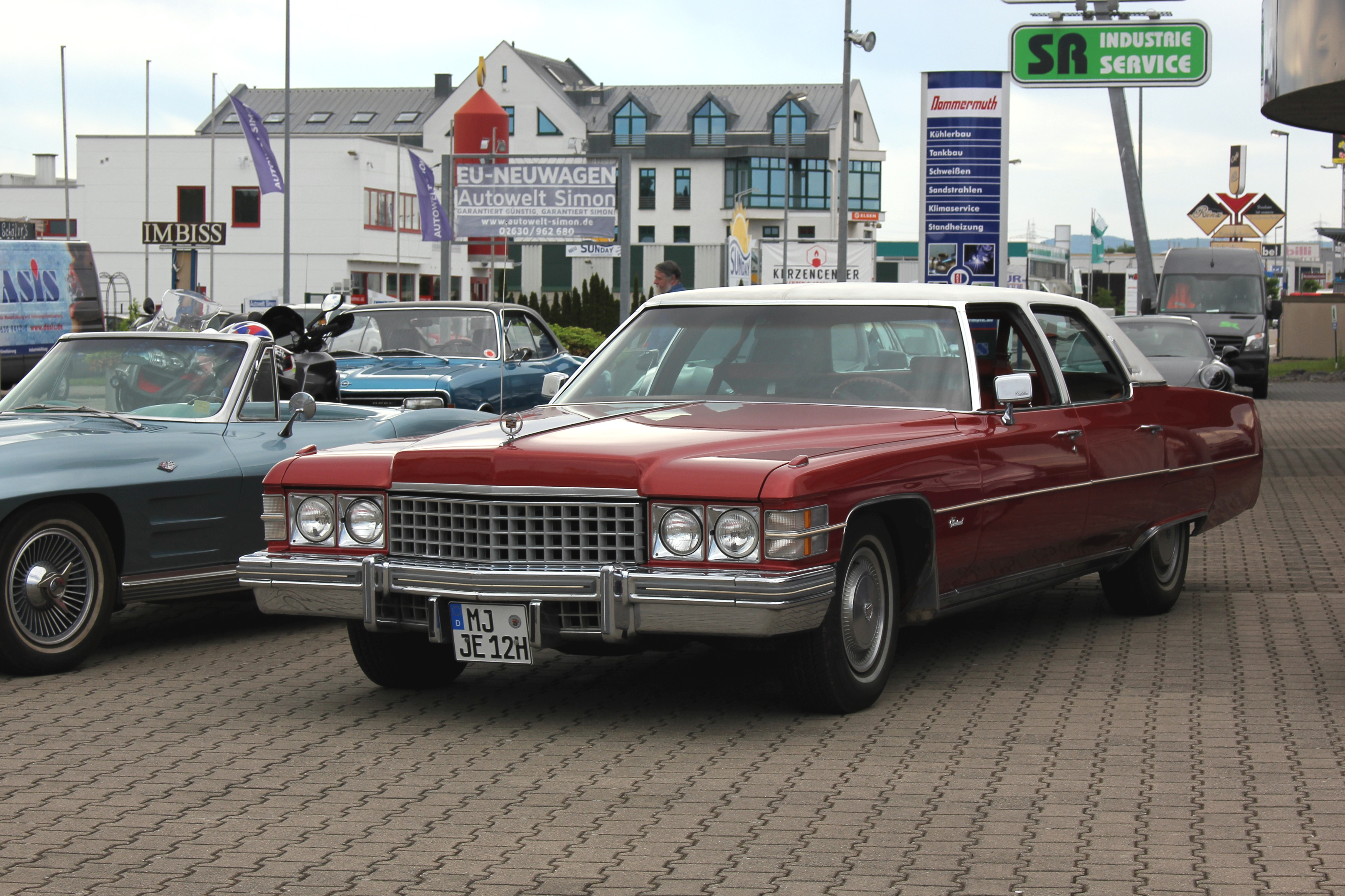 Cadillac Fleetwood Brougham, Modell 1973 bis 1974, beim Oldtimertreffen des AC Mülheim-Kärlich (Kennzeichen verändert)